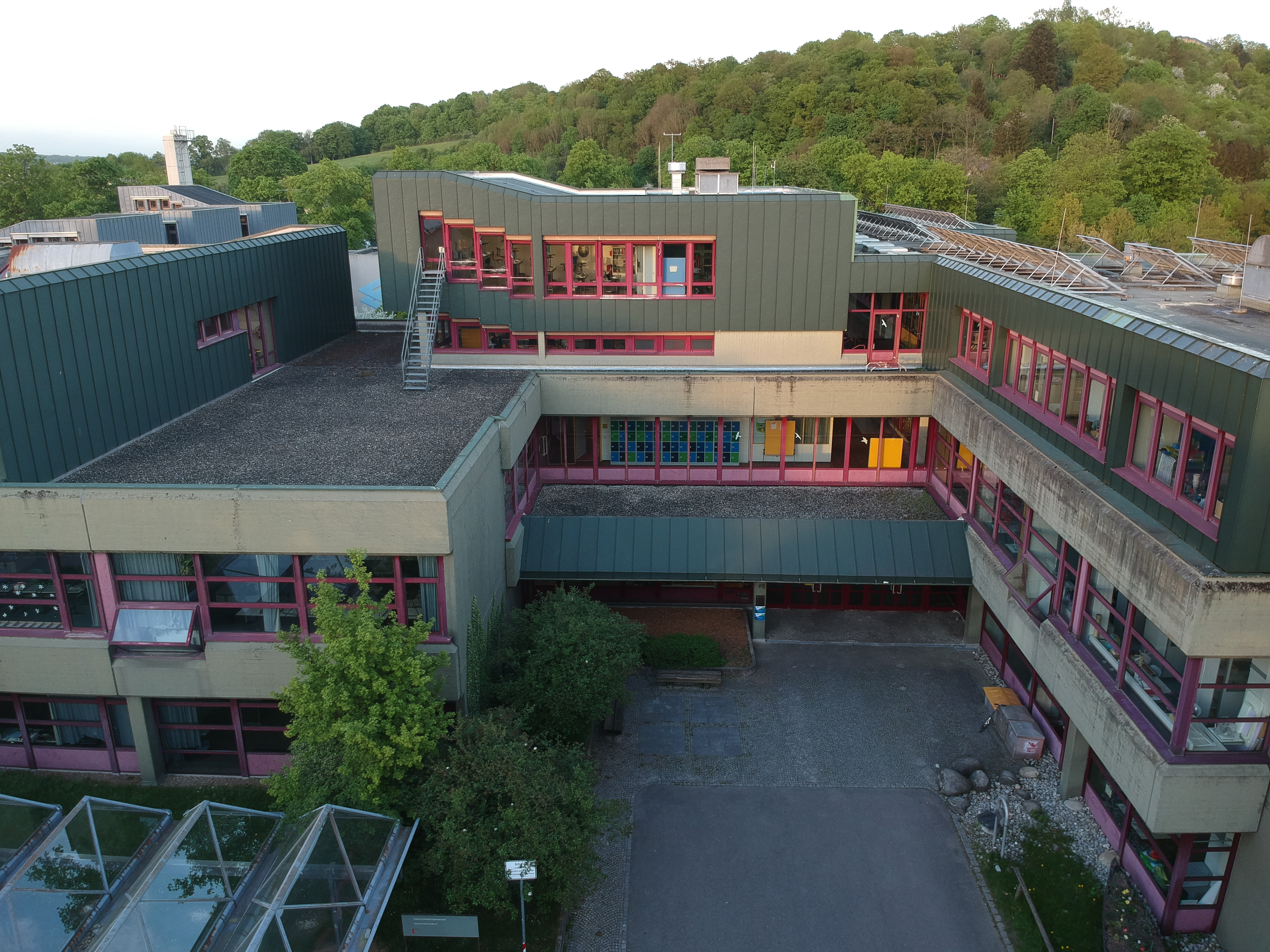 Sicht auf den Haupteingang des Carlo-Schmid-Gymnasiums in Tübingen